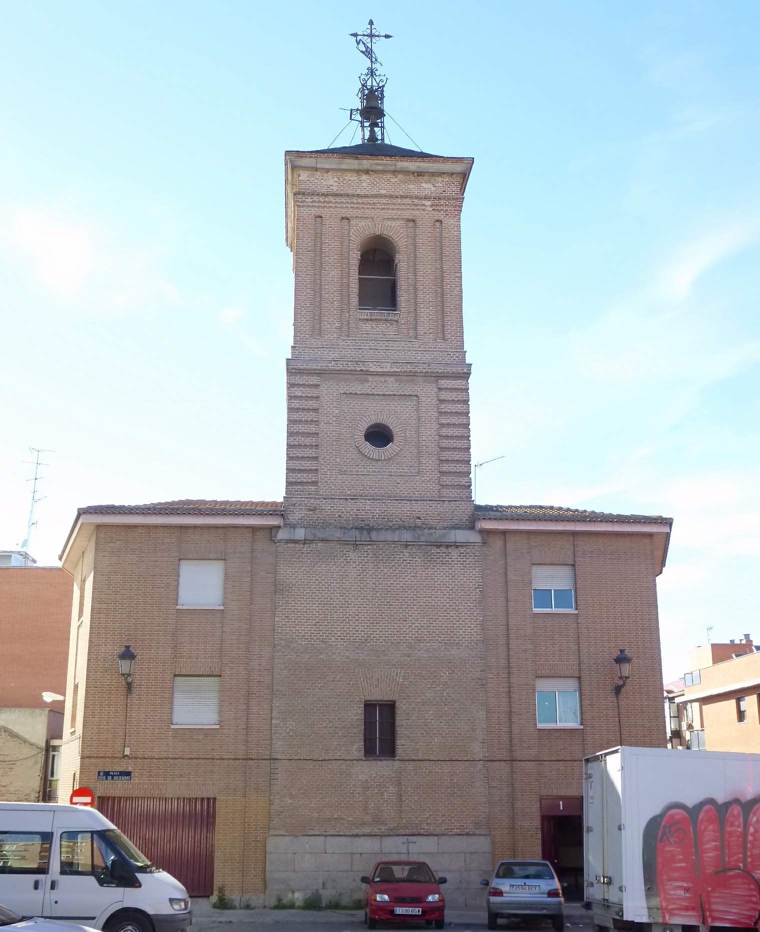 Iglesia de San Pedro Apóstol, en Carabanchel, Madrid